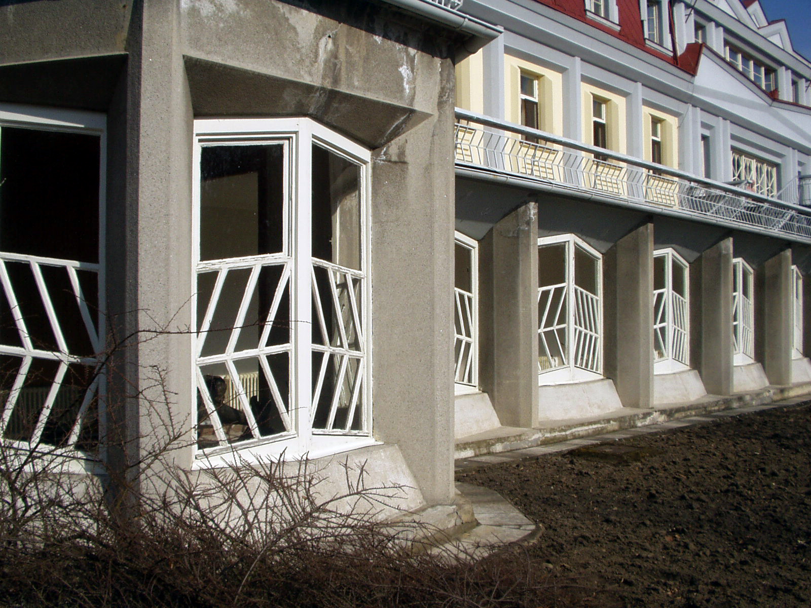 Lázeňský dům v Bohdanči je kubistická lázeňská budova postavená podle projektu architekta Josefa Gočára v letech 1912–1913 v Lázních Bohdaneč.